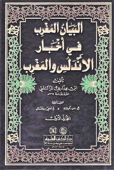 صورة غلاف لكتاب : البيان المُغْرِب في اختصار أخبار ملوك الأندلس والمغرب . من تأليف: ابن عذاري المراكشي